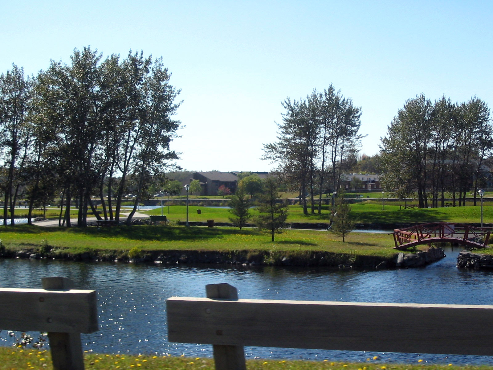 Voici une image du Parc des Îles, situé au centre-ville de Matane. Photographe : Marc-André Marchand Appareil : Canon Powershoot A60